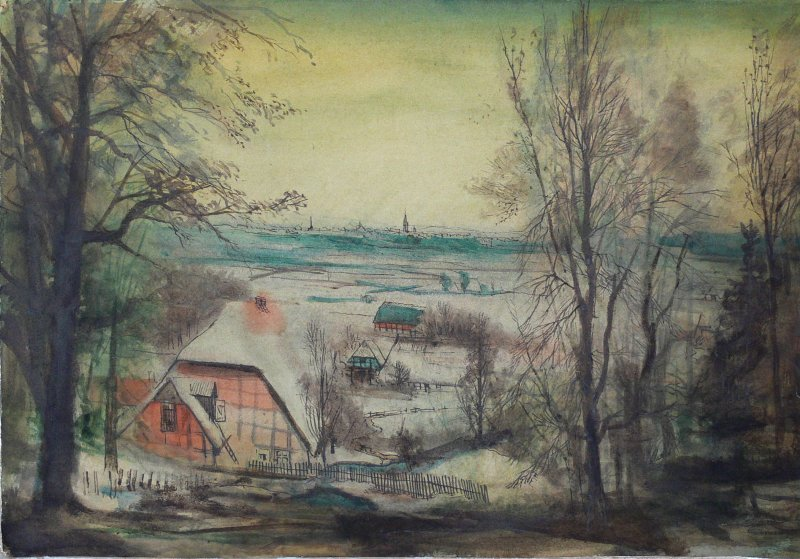 Titel: Blick auf Nienburg. Aquarell, Federzeichnung auf der Rückseite einer Flur-/Landkarte. Maße: 340 x 490 mm.